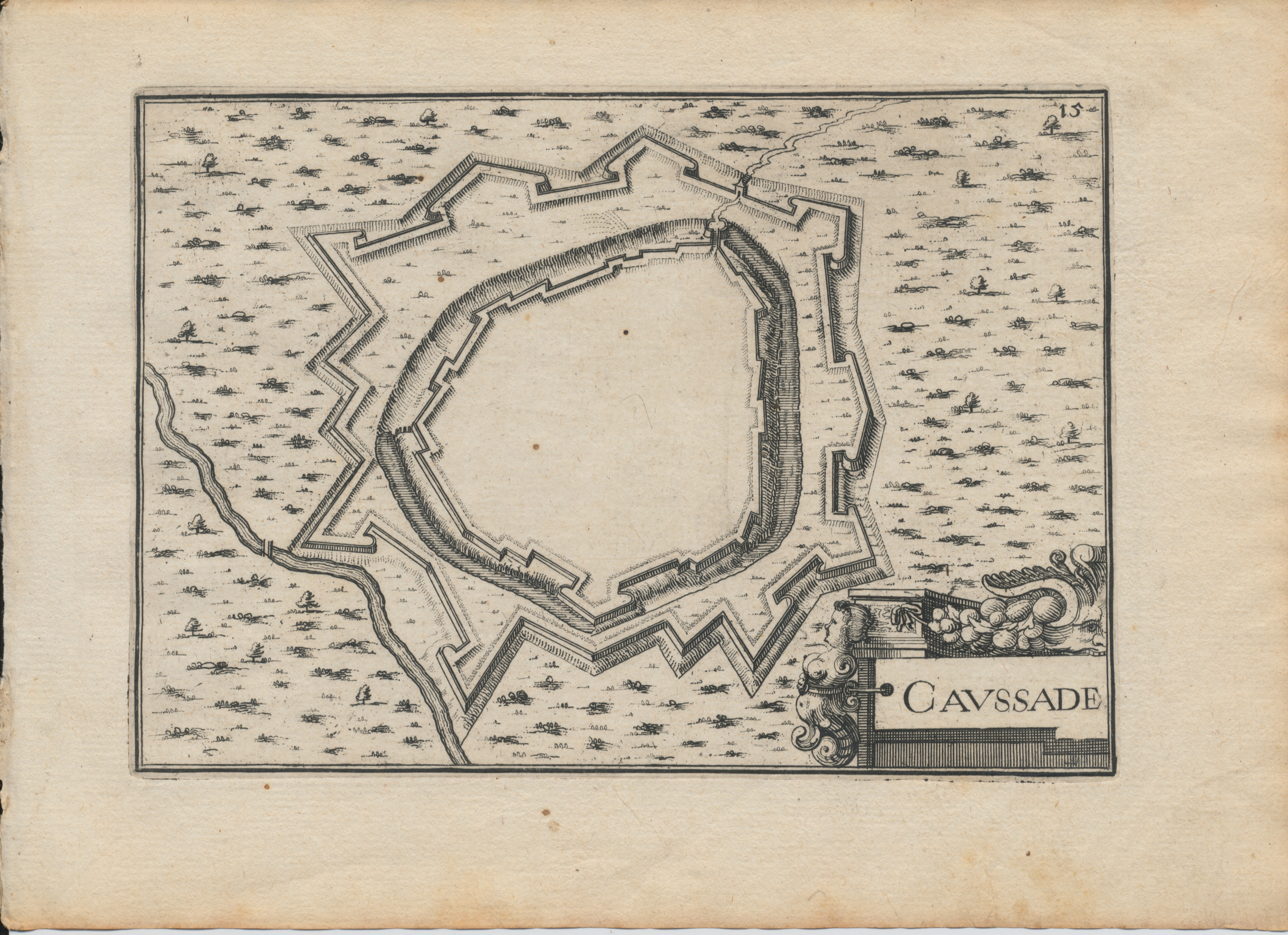 Gravure extraite de "Les Plans et Profils de toutes les principales villes et lieux considérables de France. par le Sieur TASSIN, géographe ordinaire de sa Majesté. A paris, Chez Melchior Tavernier, en l'Isle du Palais. 1634" (Languedoc)